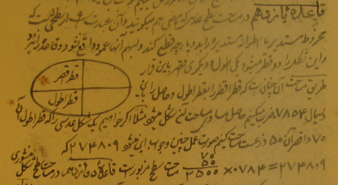 قضیه مربوط به مساحت بیضی در تحریر اصول اقلیدس، به خط ملا مهدی نراقی